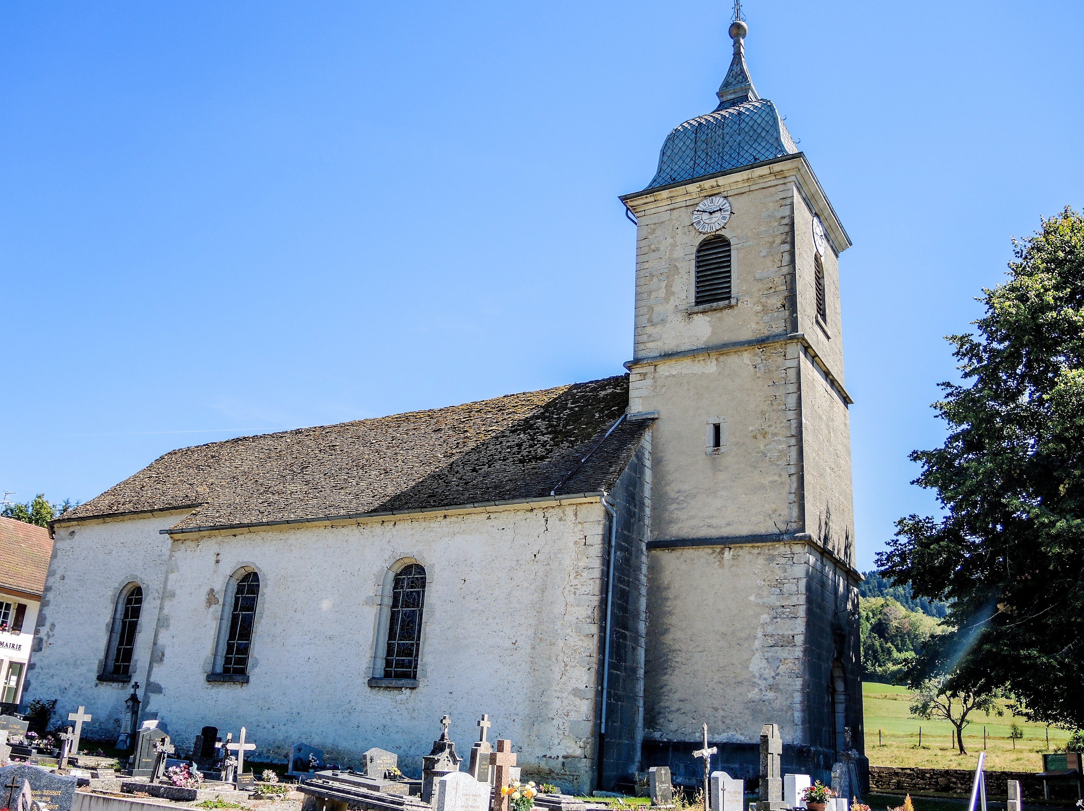 Eglise Saint-Michel des Bréseux. Doubs